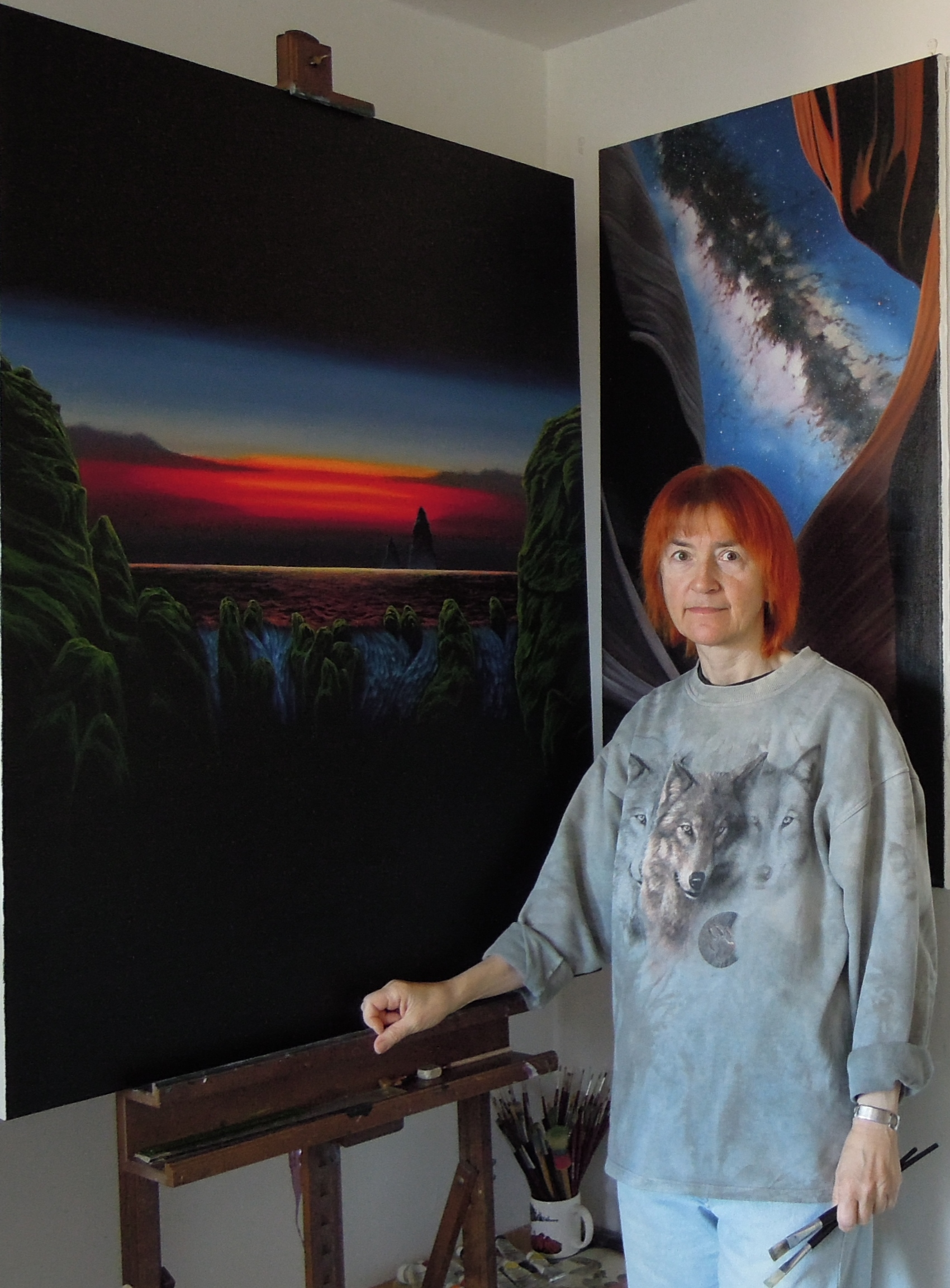 Gemälde von Gabriele L. Berndt